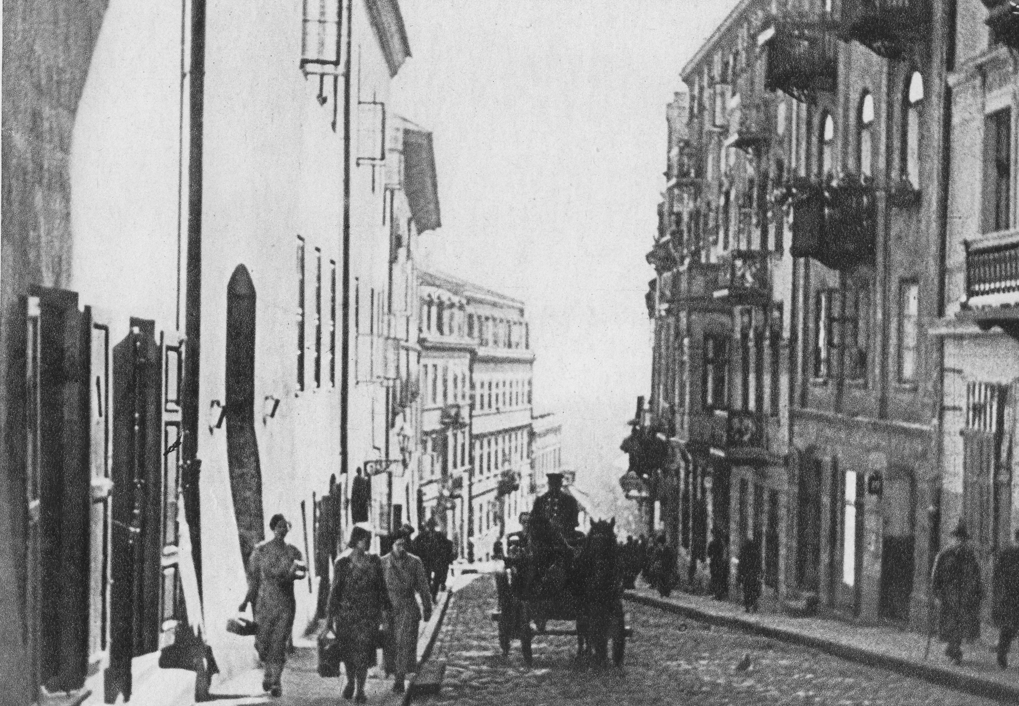 Ulica Bednarska w Warszawie przed 1939